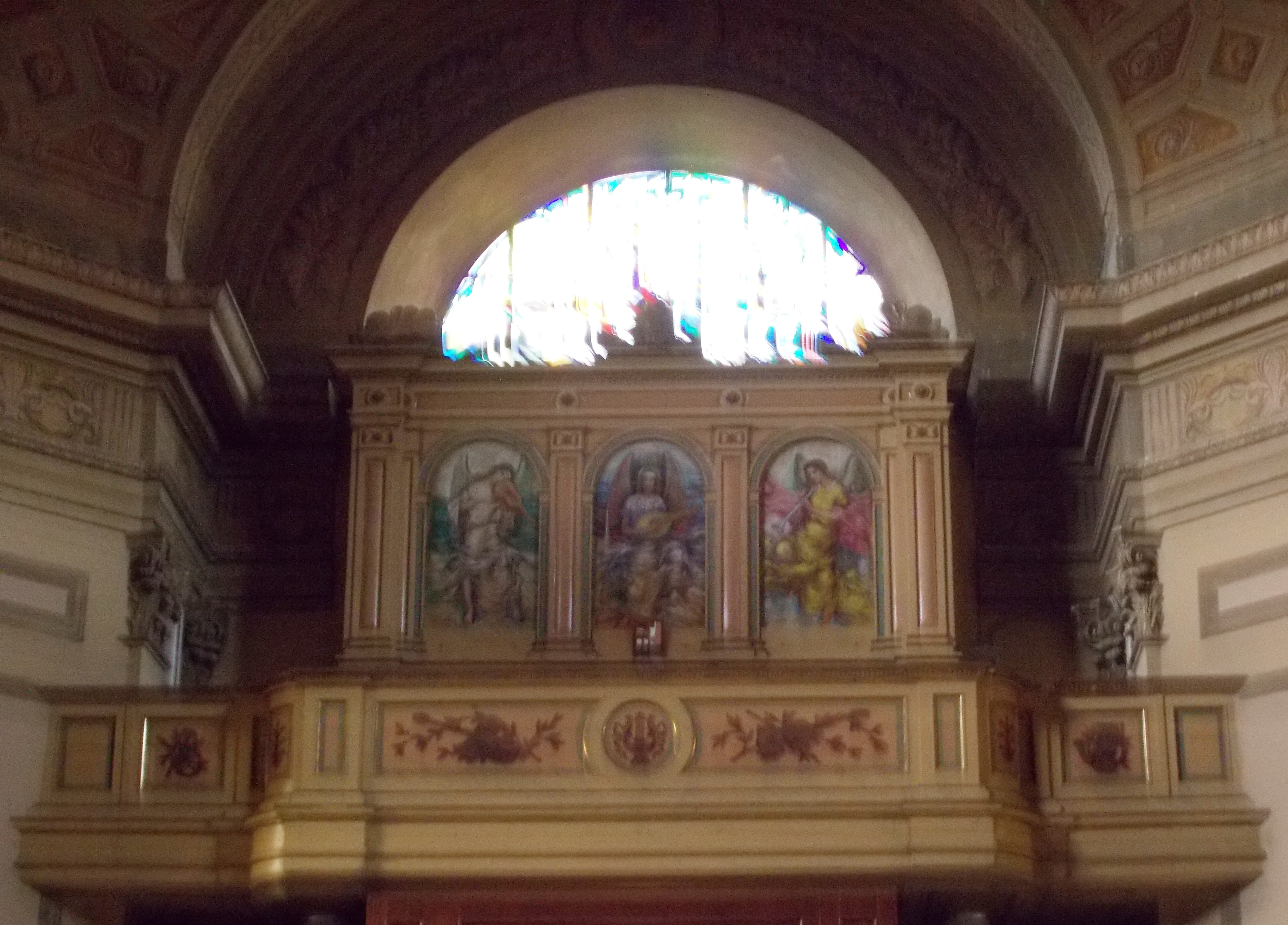 L'organo a canne Giudici (1848) della chiesa dei Santi Cornelio e Cipriano a Carnate